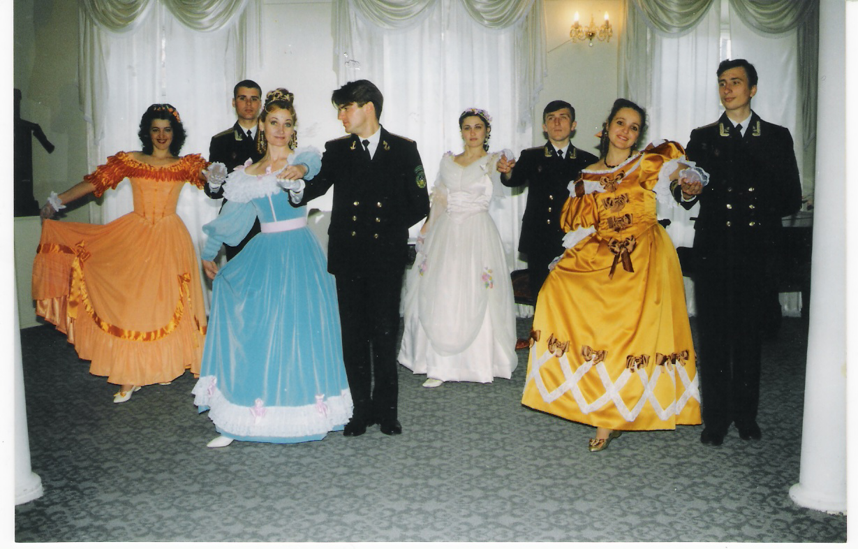 Ізмаїльський музей Придунав'я: Учасники театру "Софокл" на демонстрації вистави